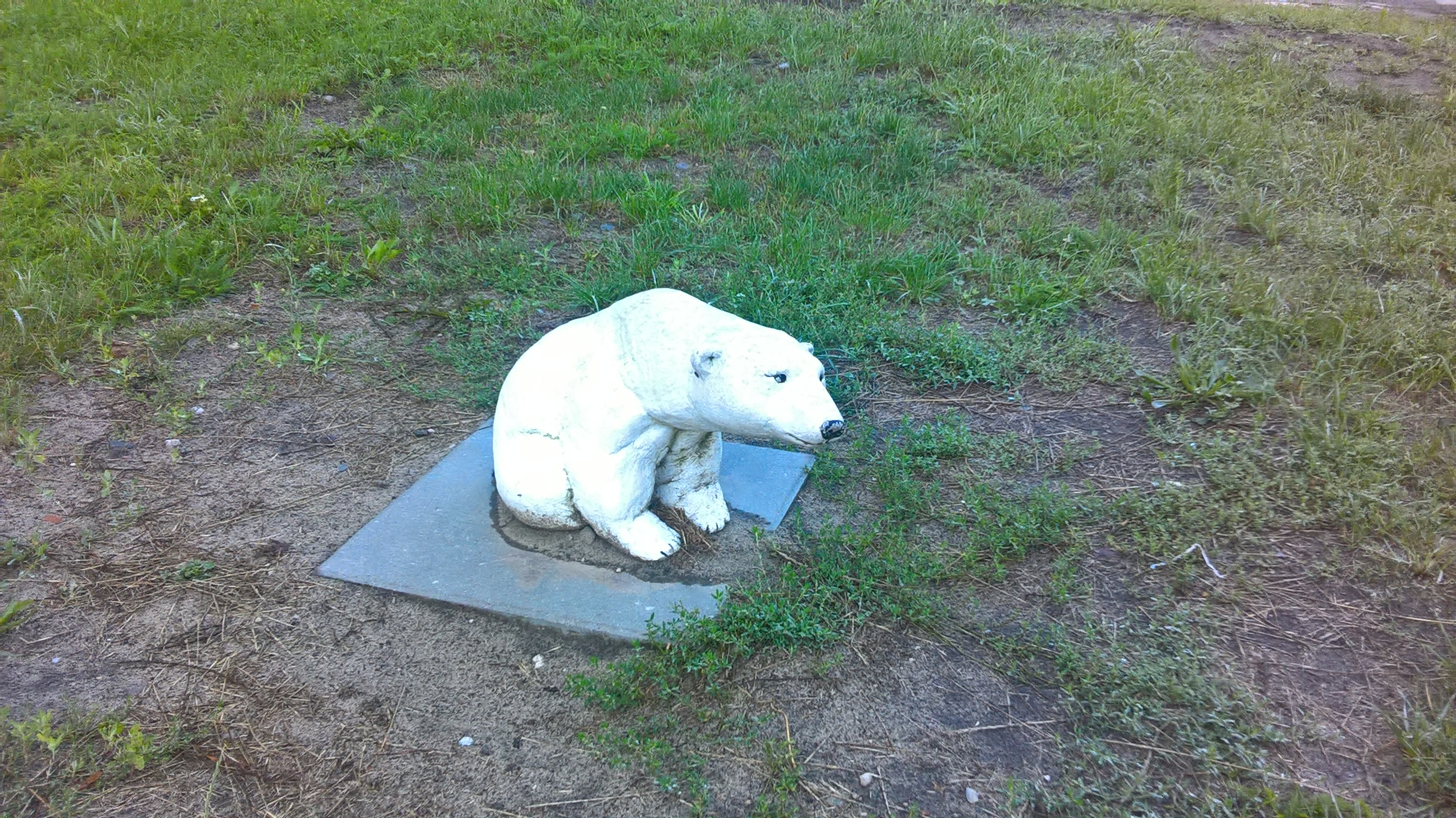 Rzeźba przedstawiająca niedźwiedzicę Baśkę Murmańską przed gmachem koszar Twierdzy w Modlinie.